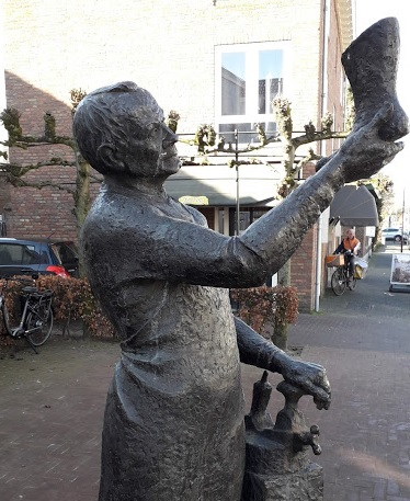 Het standbeeld is geplaatst in het centrum van Kaatsheuvel als monument voor de rijke schoenindustrie in het dorp. Omdat de Nederlandse lonen relatief hoog waren i.v.m. andere landen, werd steeds meer schoenproductie verplaatst naar Zuid-Europese landen. Kaatsheuvel moest zijn geld op een andere manier verdienen. Uiteindelijk bleek dit toerisme te zijn, met het succesvolle park Efteling en National Park Loonse en Drunense Duinen als trekpleisters.